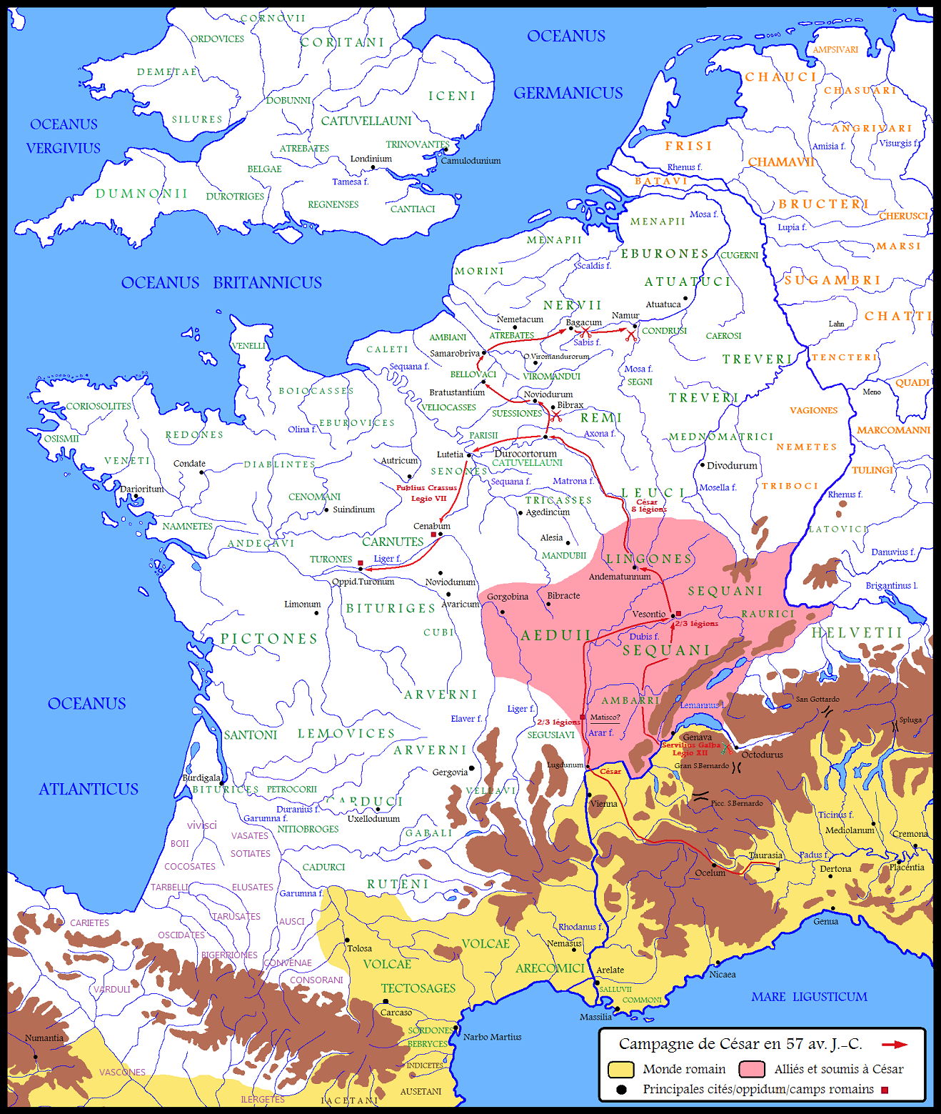 La Gaule en 57 av. J.-C. / Deuxième année de campagne de César